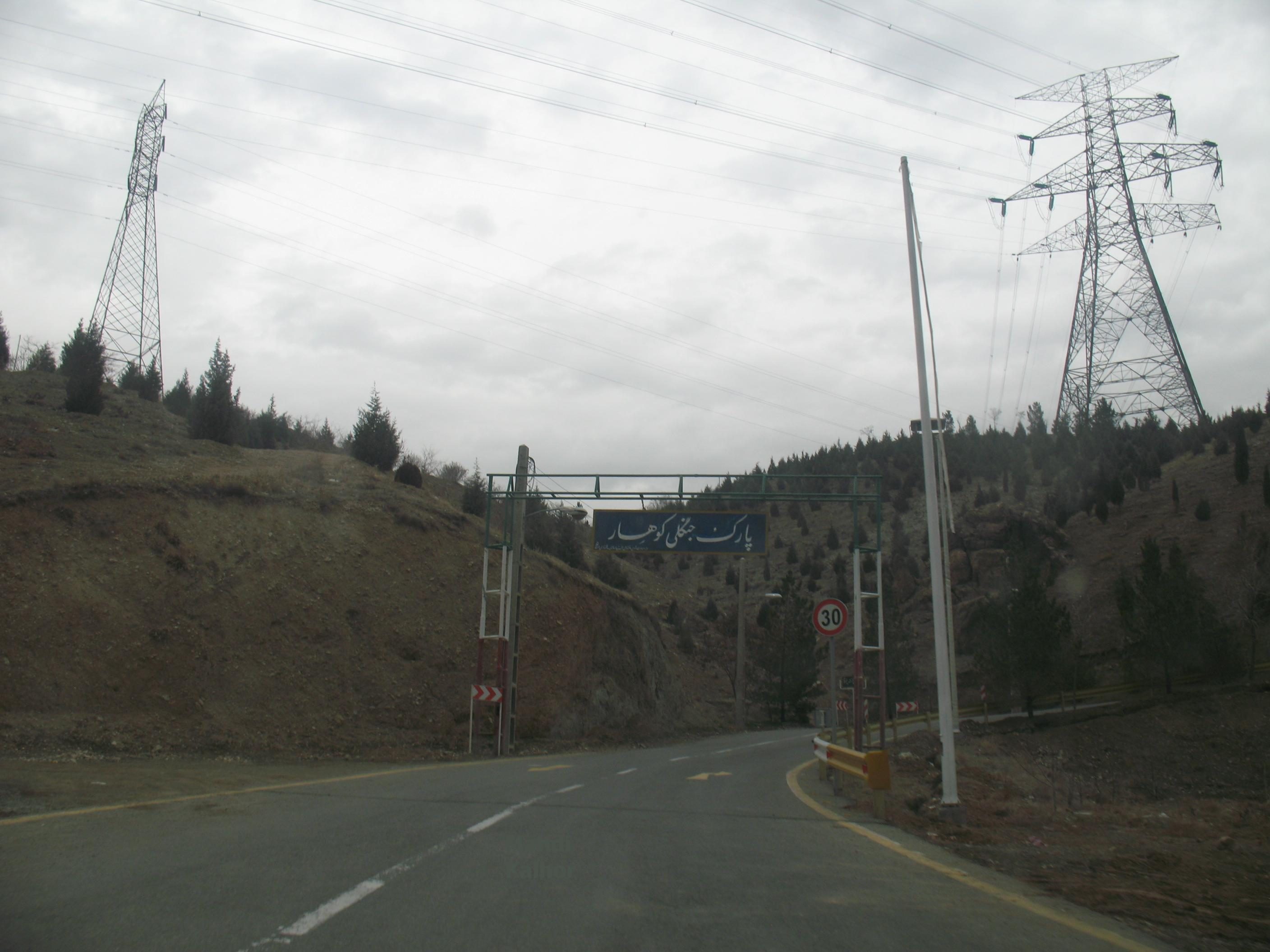 Well come to Kuhsar, Park-e Kuhsar, Tehran به پارک کوهسار خوش آمدید